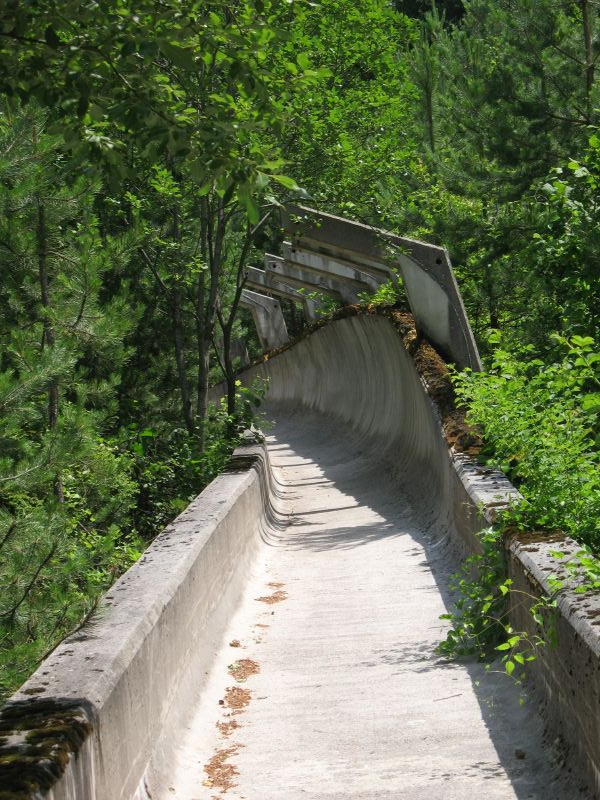 De bobslee baan is speciaal gebouwd voor de 14e Olympische Winterspelen van 1984 in Sarajevo, en is tijdens de belegering van Sarajevo door de Serven vernietigd.